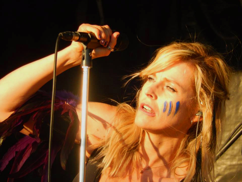 Kohann 13 08 2015 Ploemeur